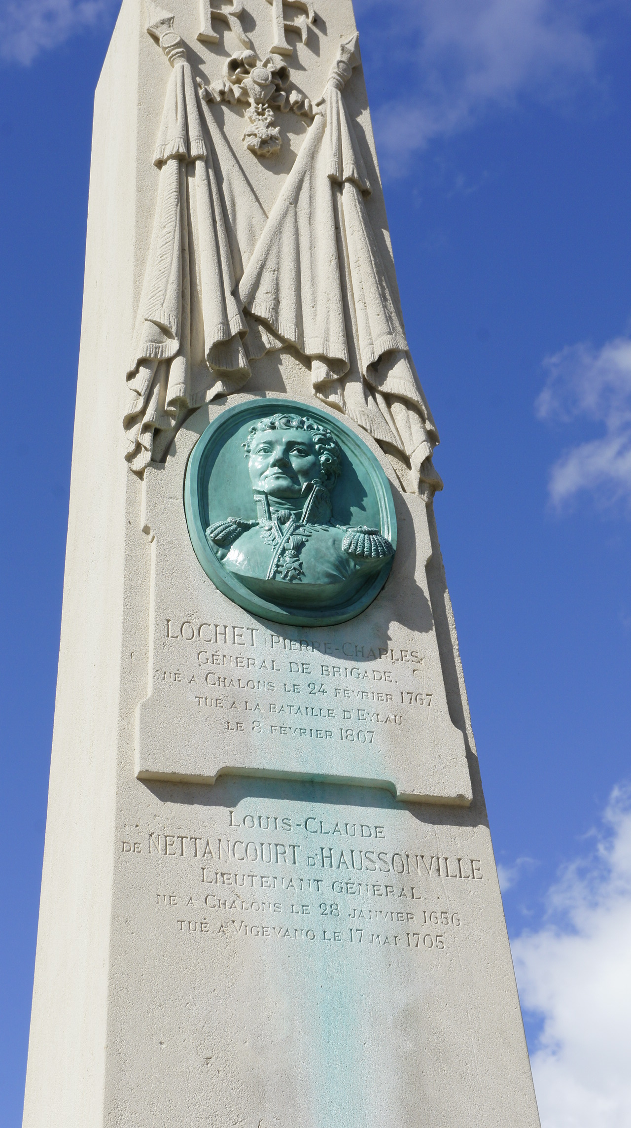 Une obélisque du cimetière de l'est de Châlons en homme au général Lochet.